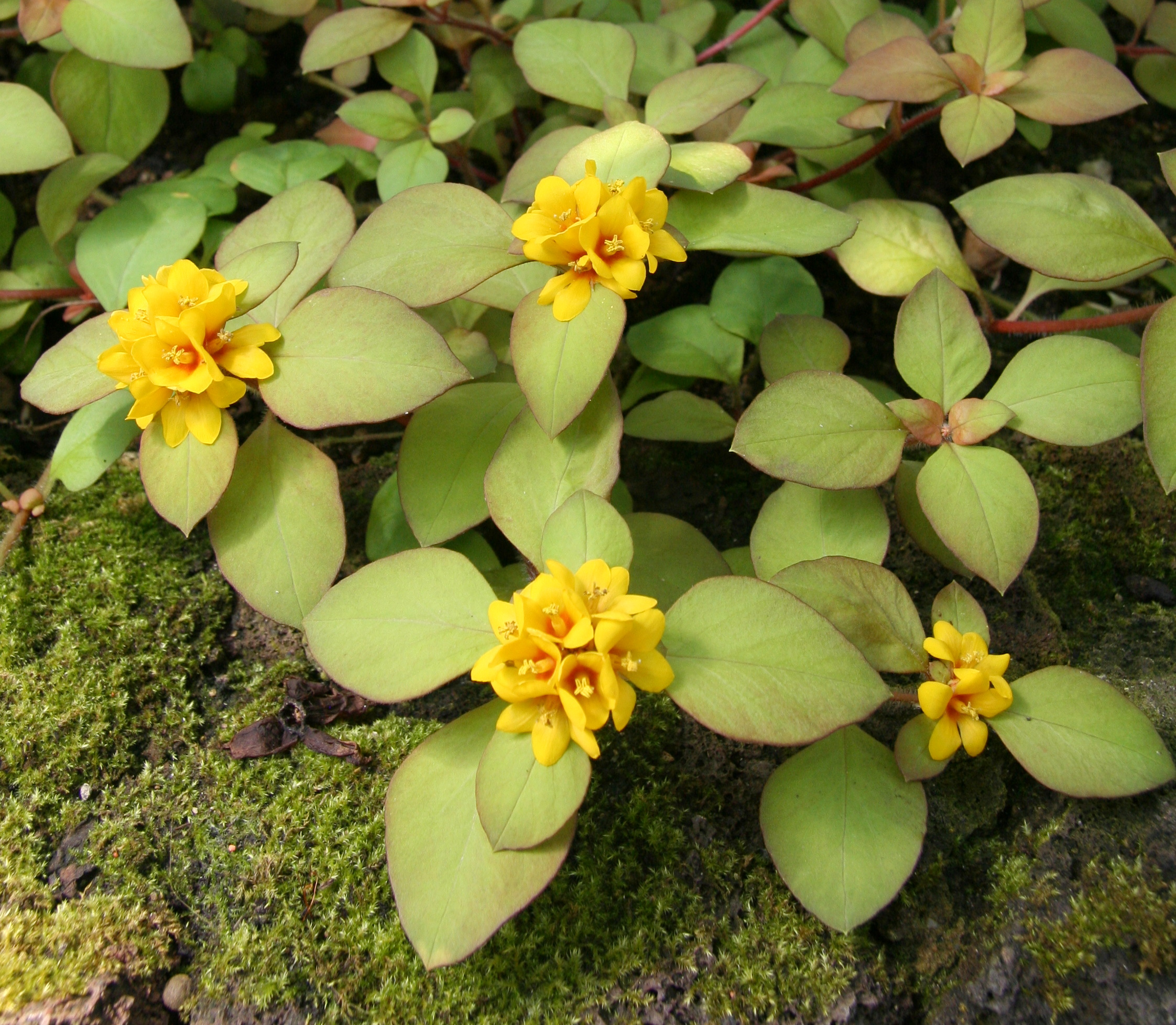 Lysimachia phyllocephala im Botanischen Garten Berlin